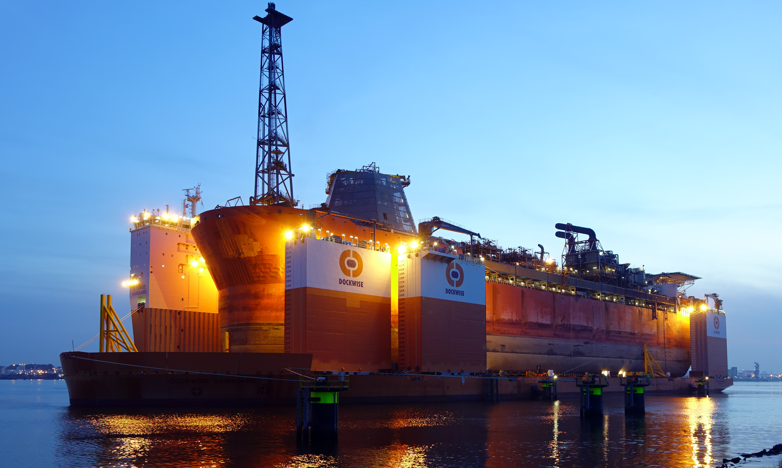 Calandkanaal 10-5-2015